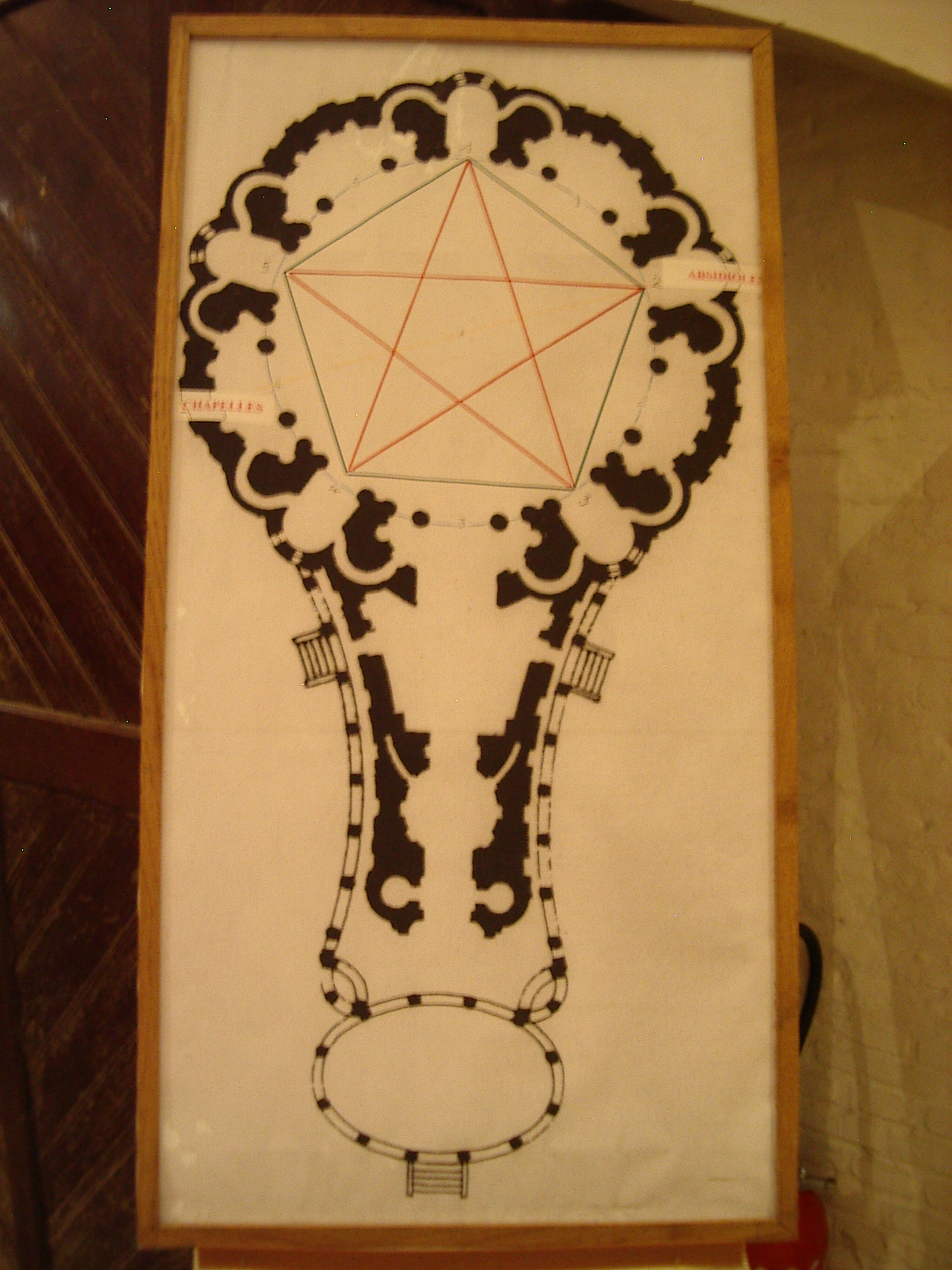 Église Saint-Didier d'Asfeld, Plan (forme d’une viole), Asfeld, Ardennes, France